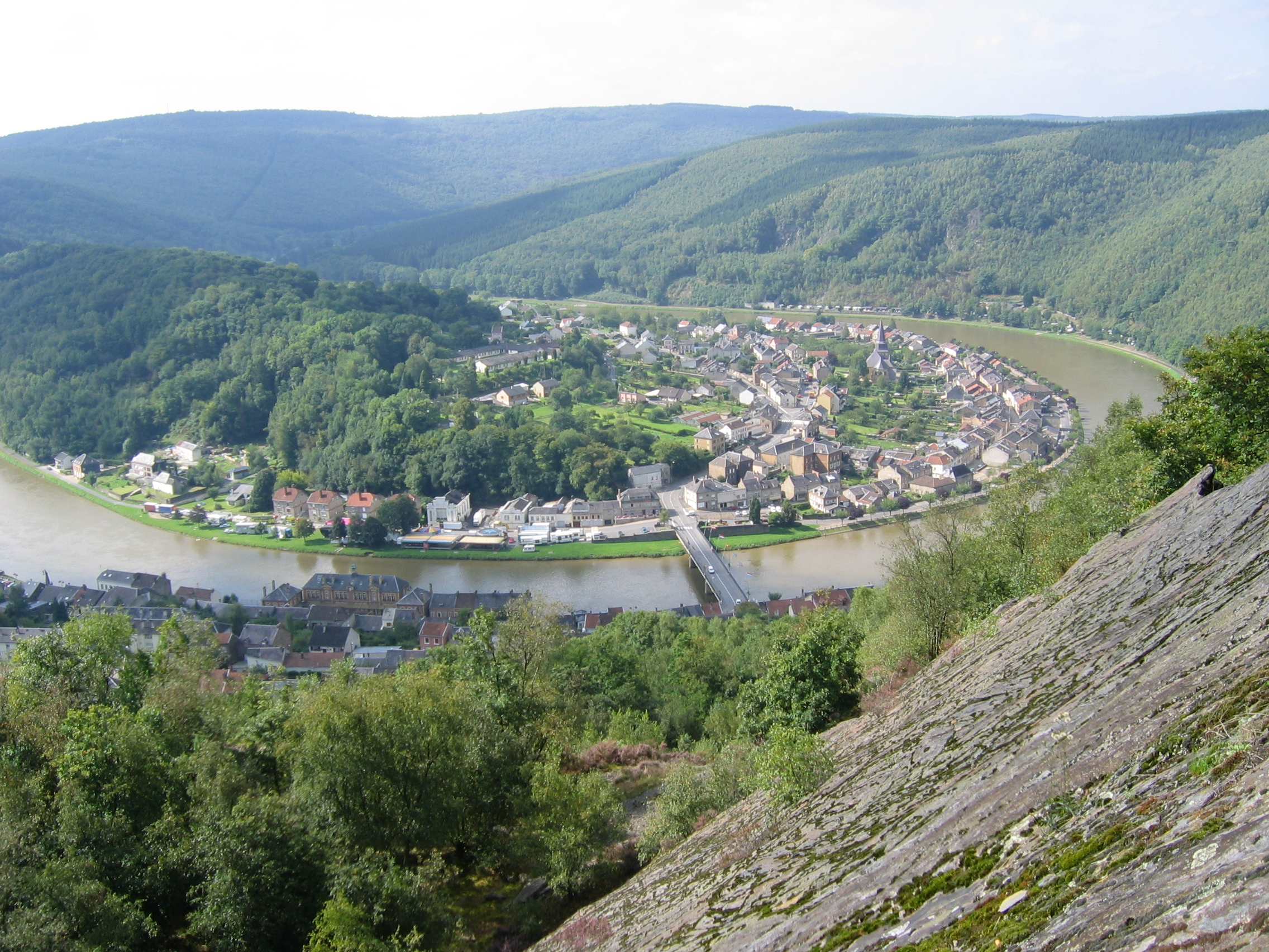 Monthermé:méandre de la Meuse